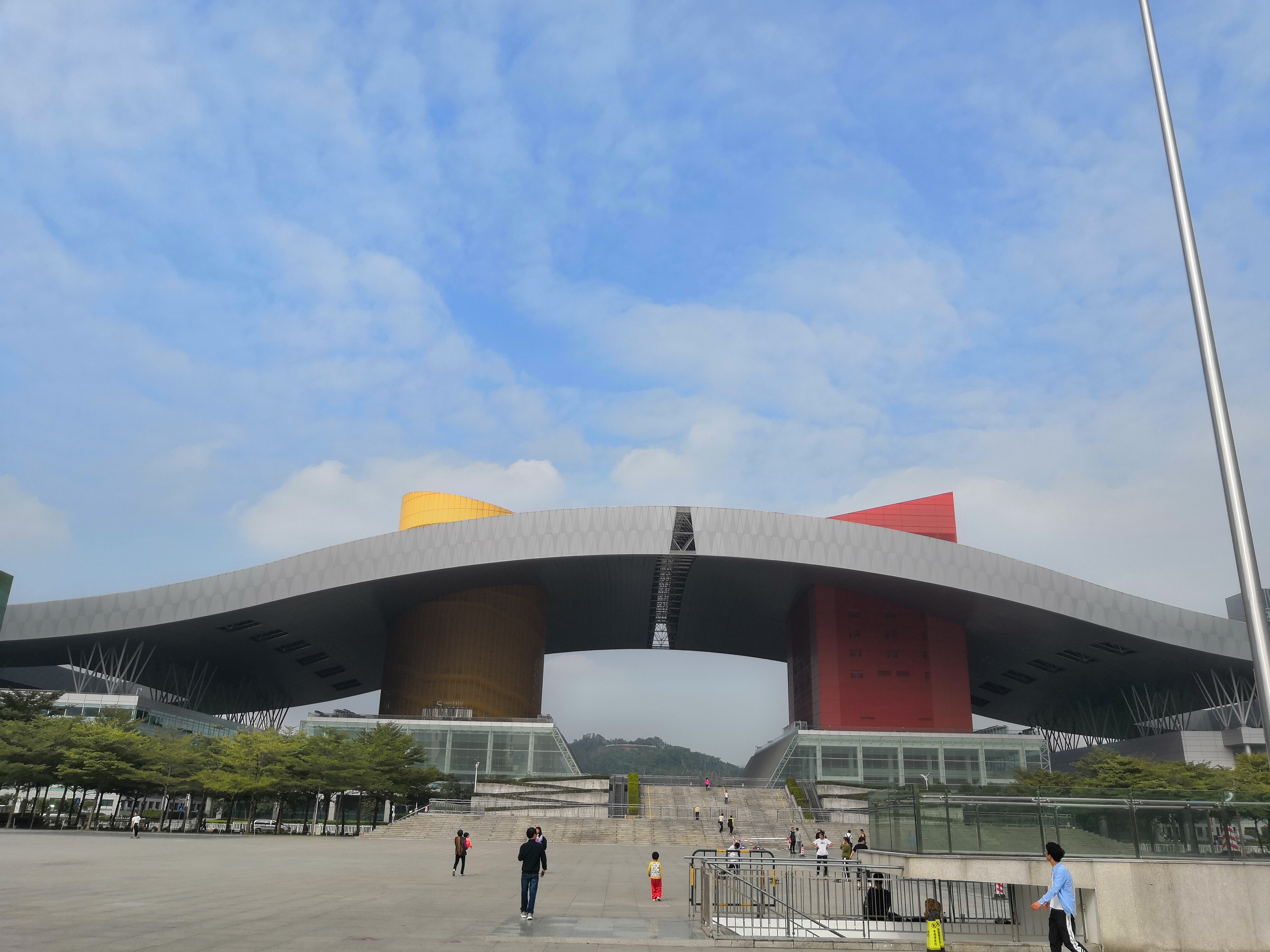 中文（中国大陆）: 深圳市民中心